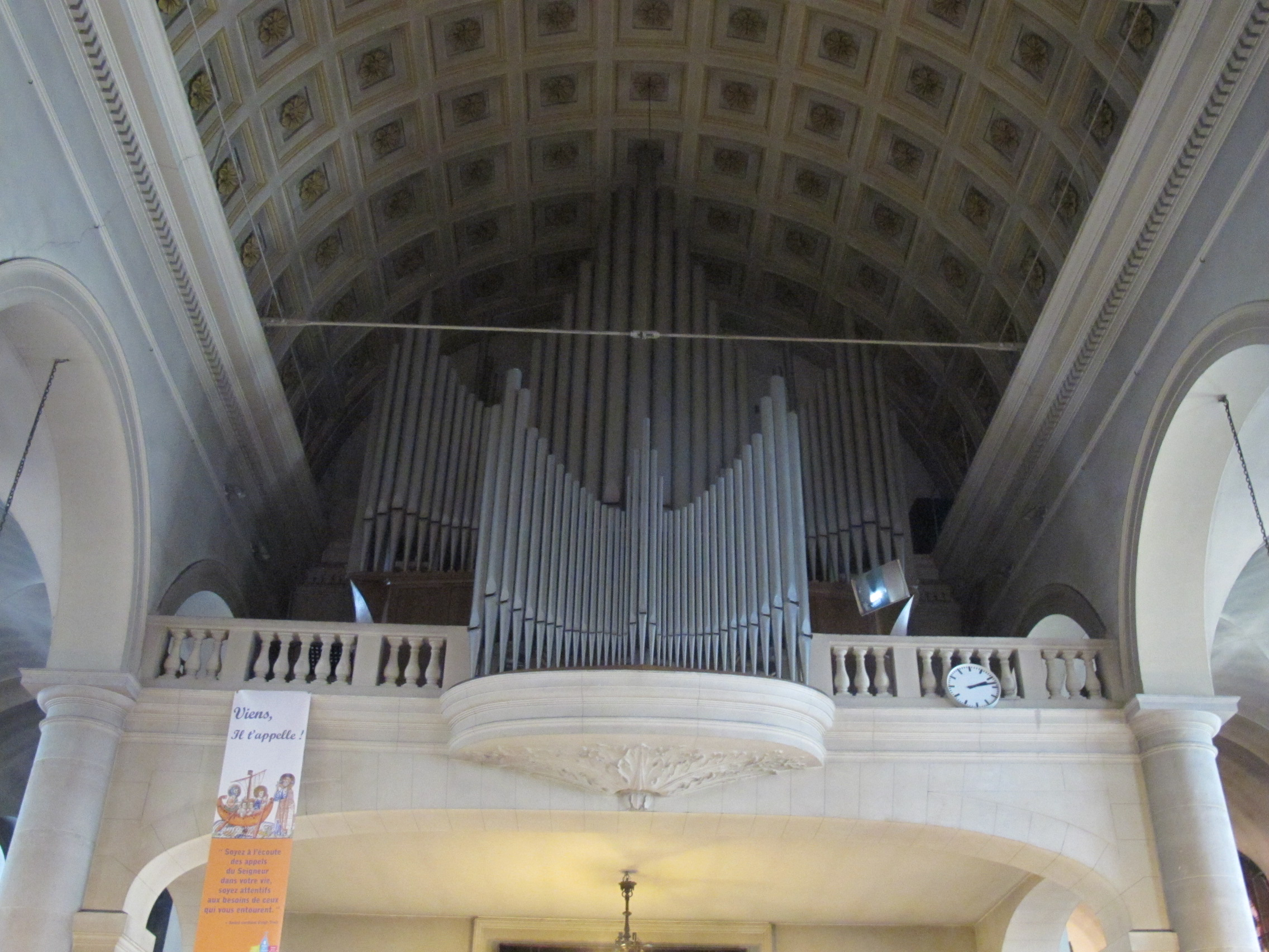 Église Saint-Pierre-du-Gros-Caillou, Rue Saint-Dominique, Paris